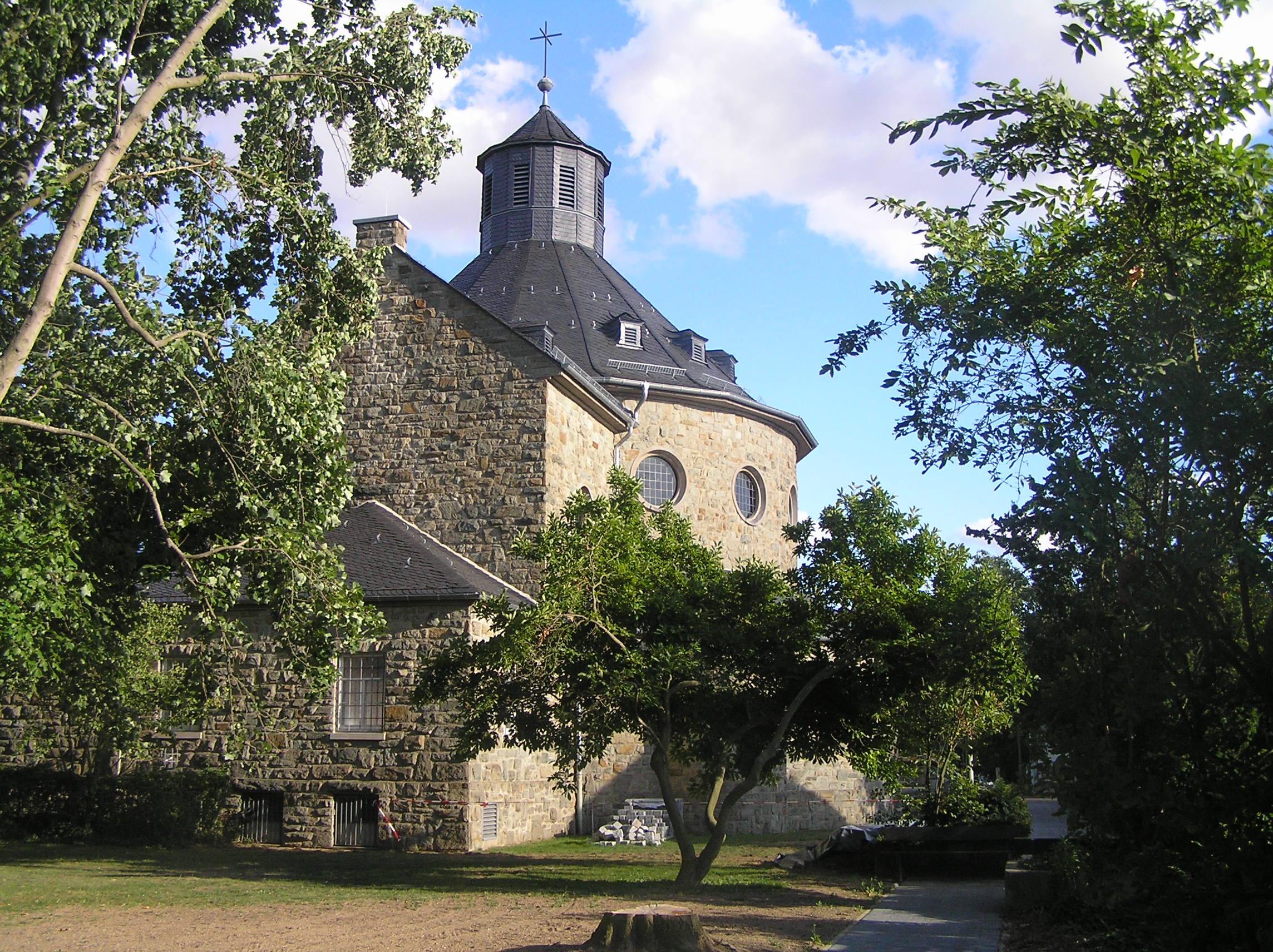 Neue Martinskirche in Hornau, Kelkheim. Das Bild zeigt die Rückseite des 1952 errichteten Gebäudes.